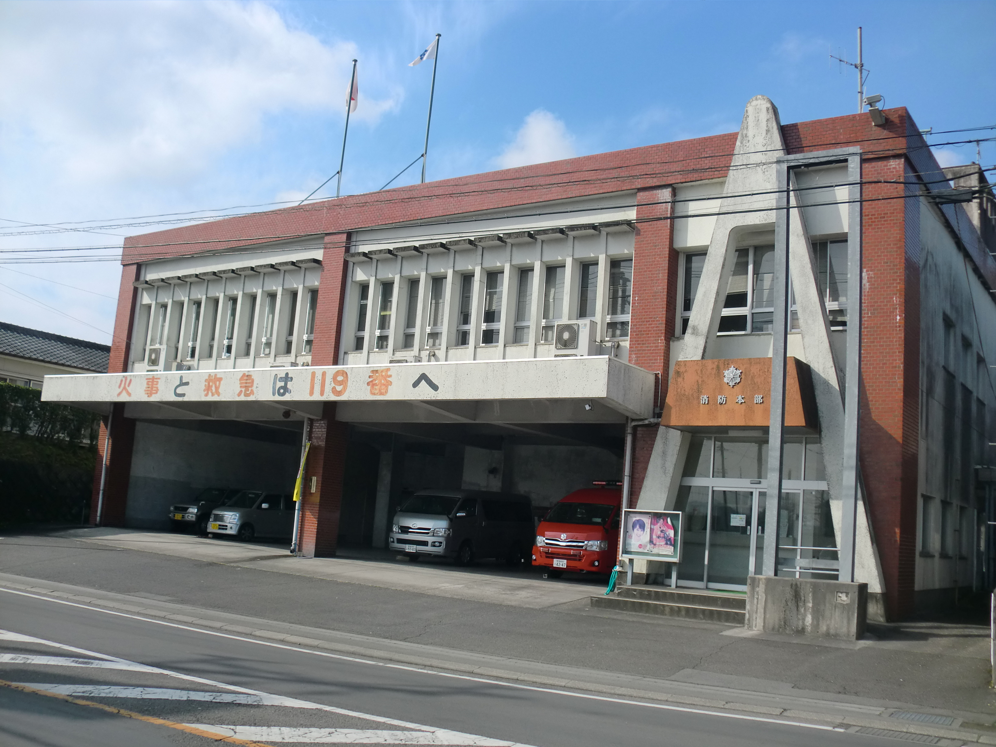 曽於市にある大隅曽於地区消防本部